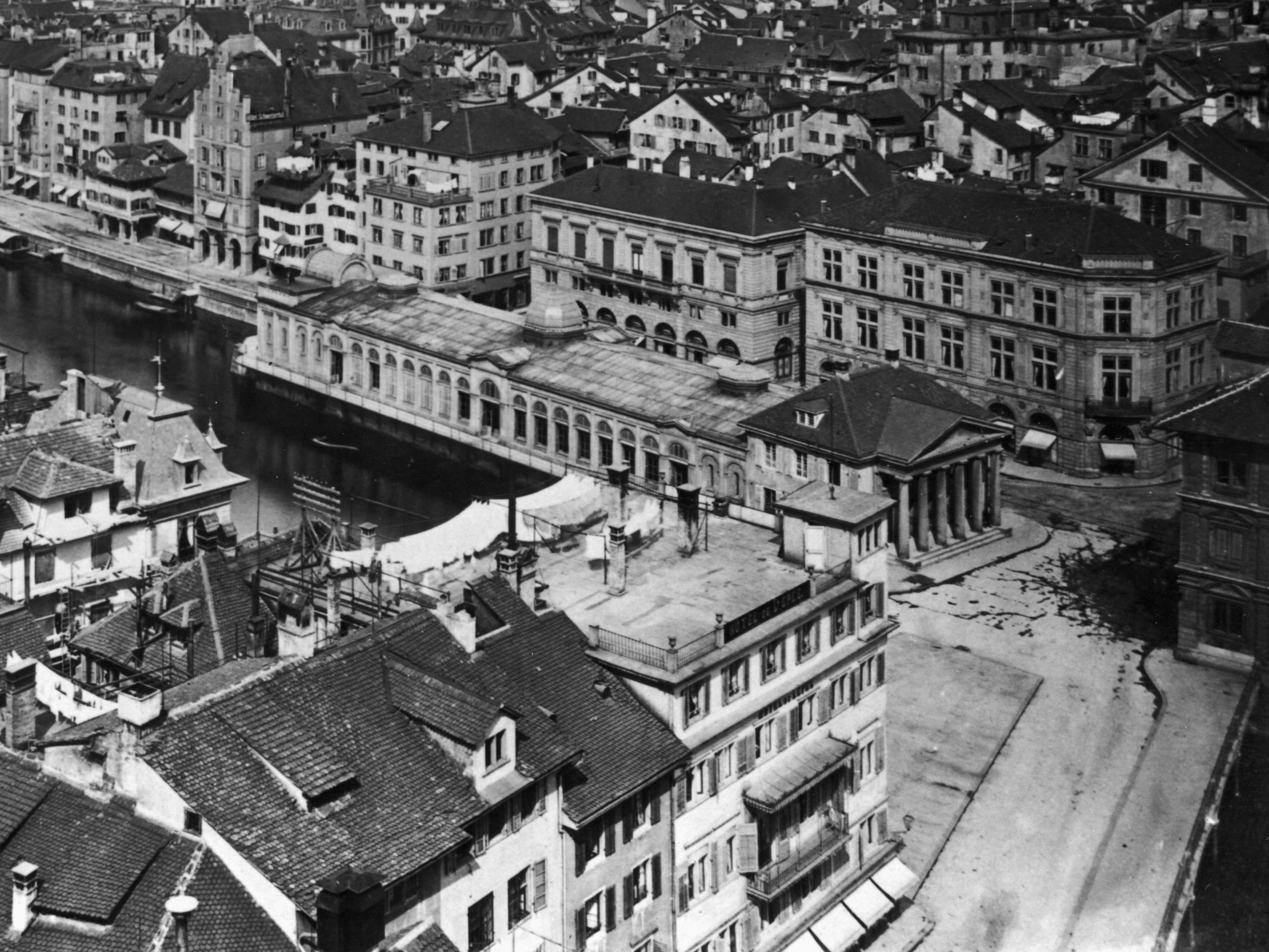 Ansicht der Fleischhalle Zürich mit der Rathausbrücke und des Limmatquais, ca. 1880